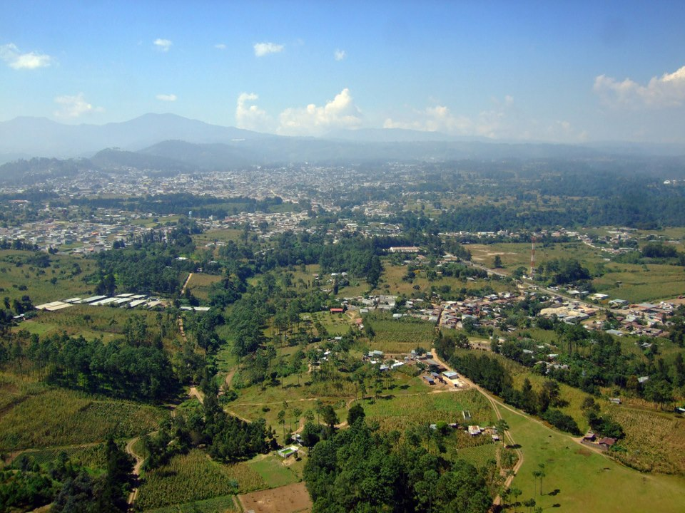 Ciudad de Chimaltenango